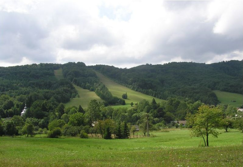 DescriptionCelkový pohľadDate25 June 2006SourceOwn workAuthorAndrej BelovežčíkPermission (Reusing this file) anoCelkový pohľad